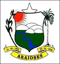 araiosesnse